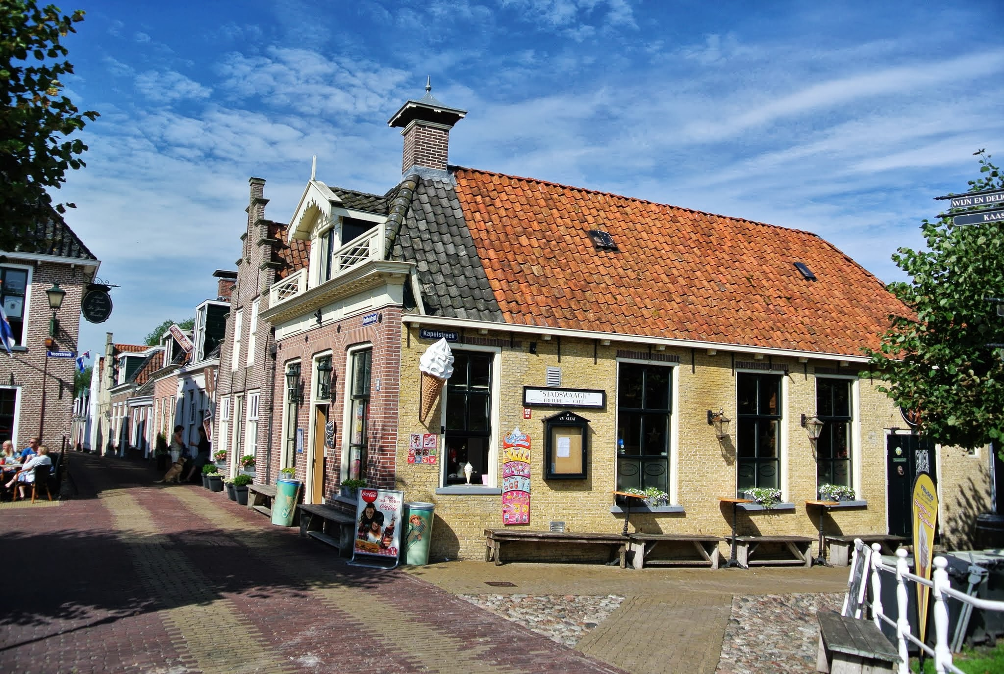 8556 Sloten, Netherlands